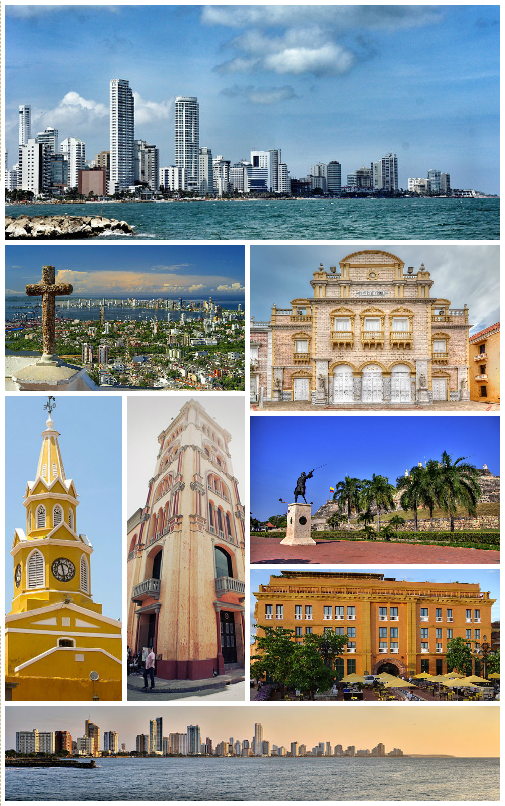 Cartagena